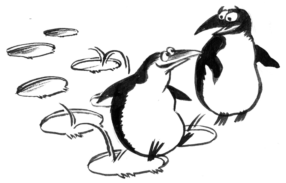 Haut de page de Framagora